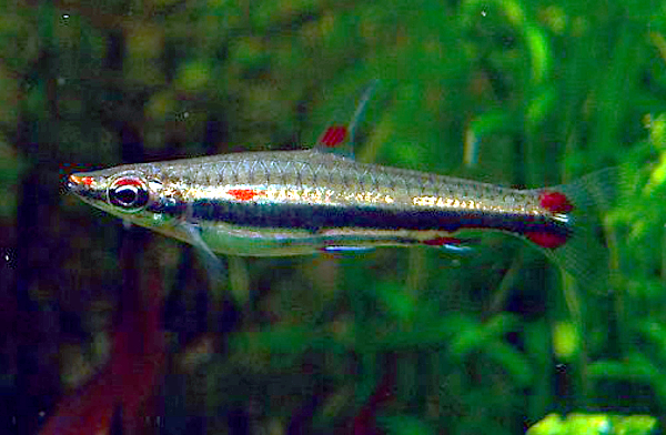 Goldbinden-Ziersalmler (Nannostomus trifasciatus)